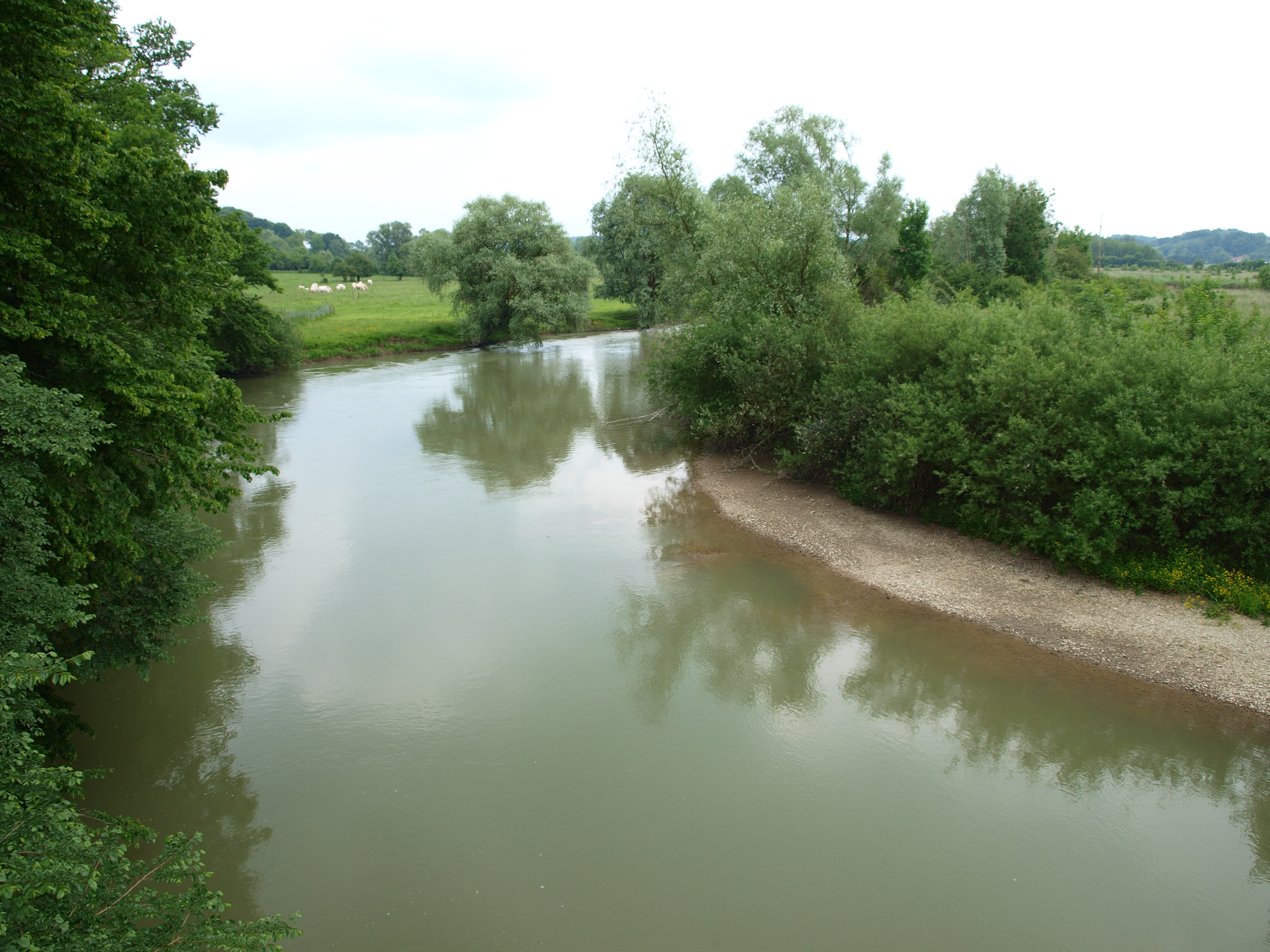 Falaise (Ardennes, France) ; l'Aisne